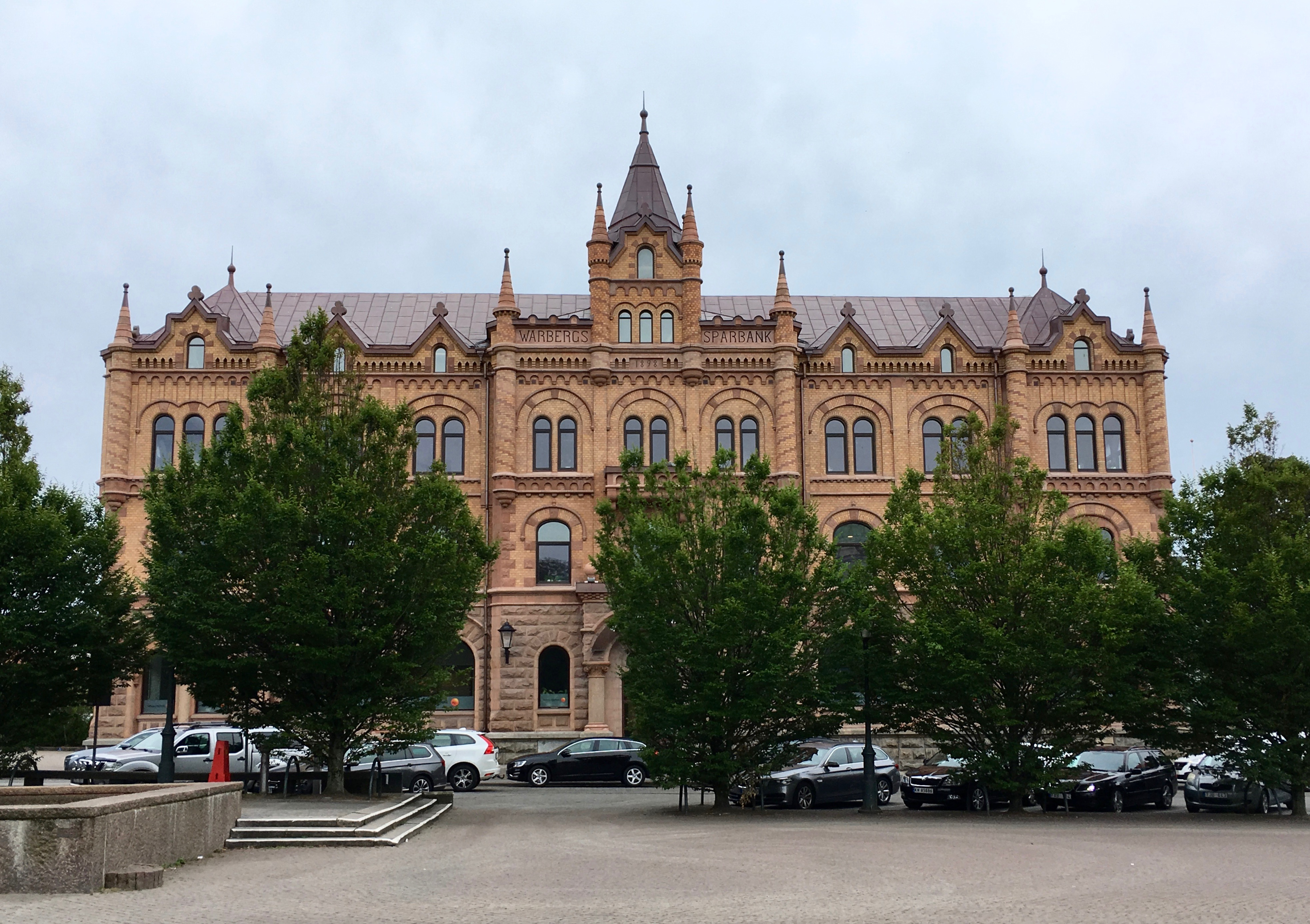 Varbergs Sparbanks gamla hus på Bäckgatan 16-18 i Varberg.